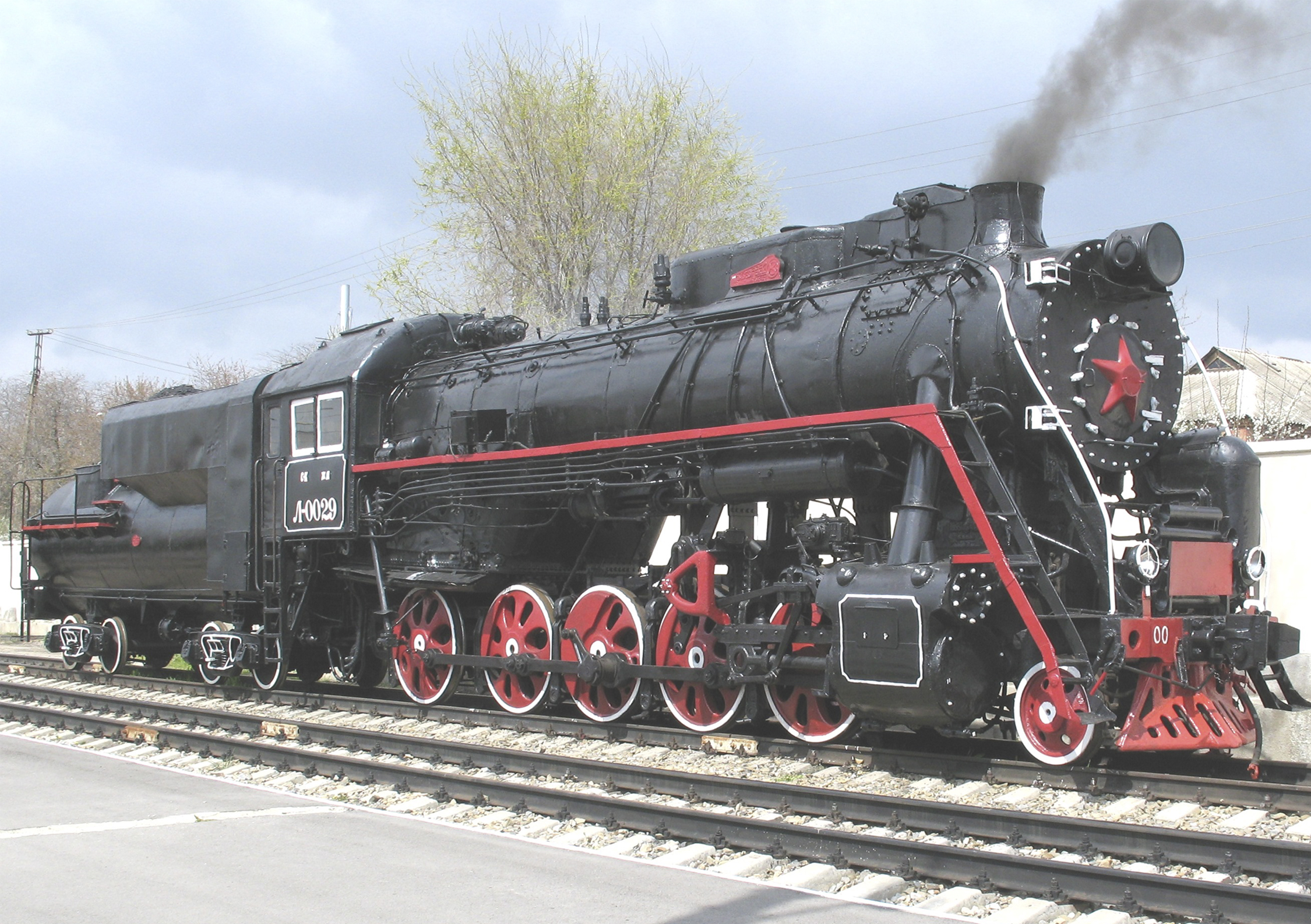 Паровоз построен в 1946 году Коломенским паровозостроительным заводом